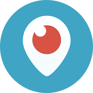 Periscope logotype officiel